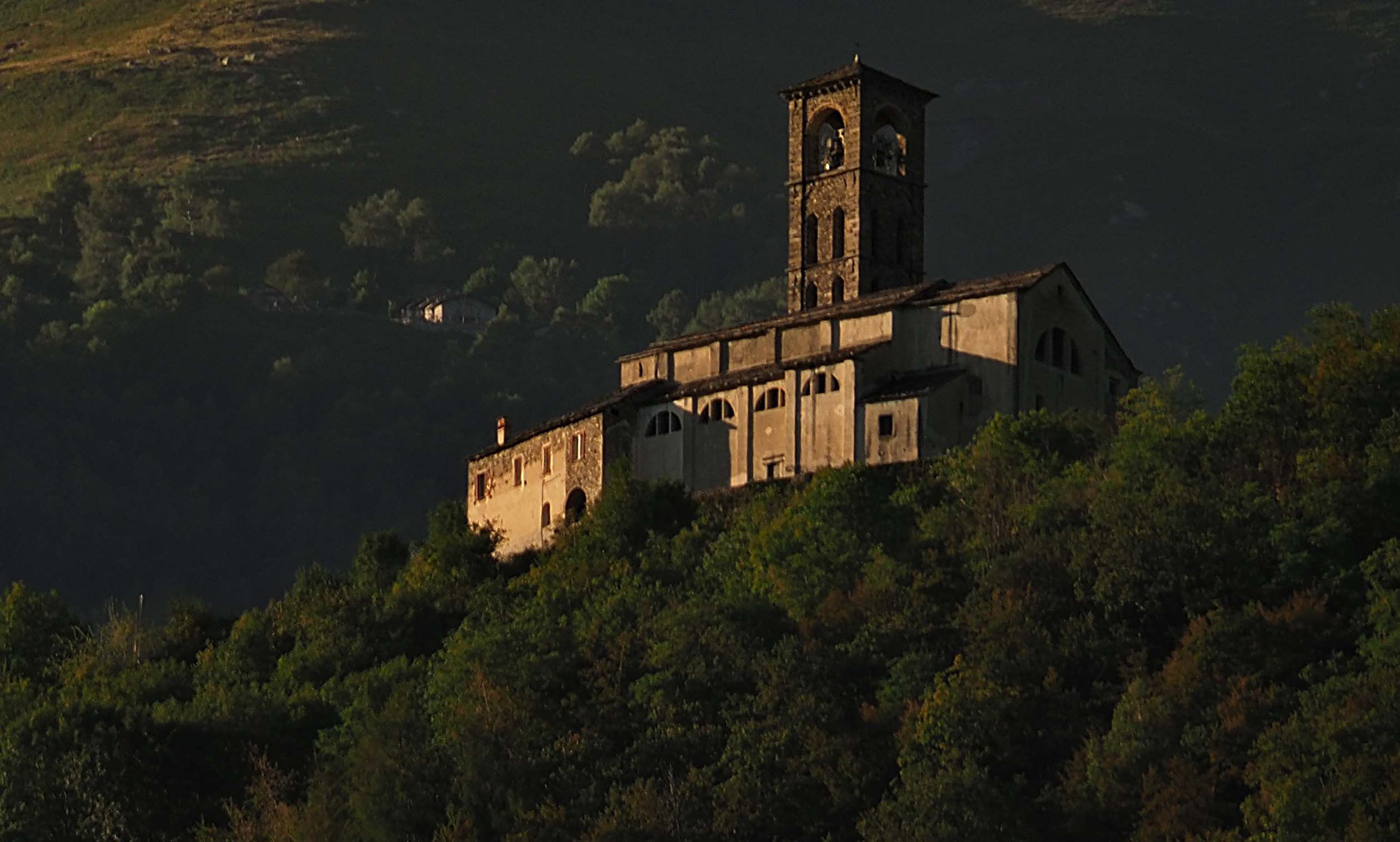 chiesa di Sant'Eusebio This is a photo of a monument which is part of cultural heritage of Italy.